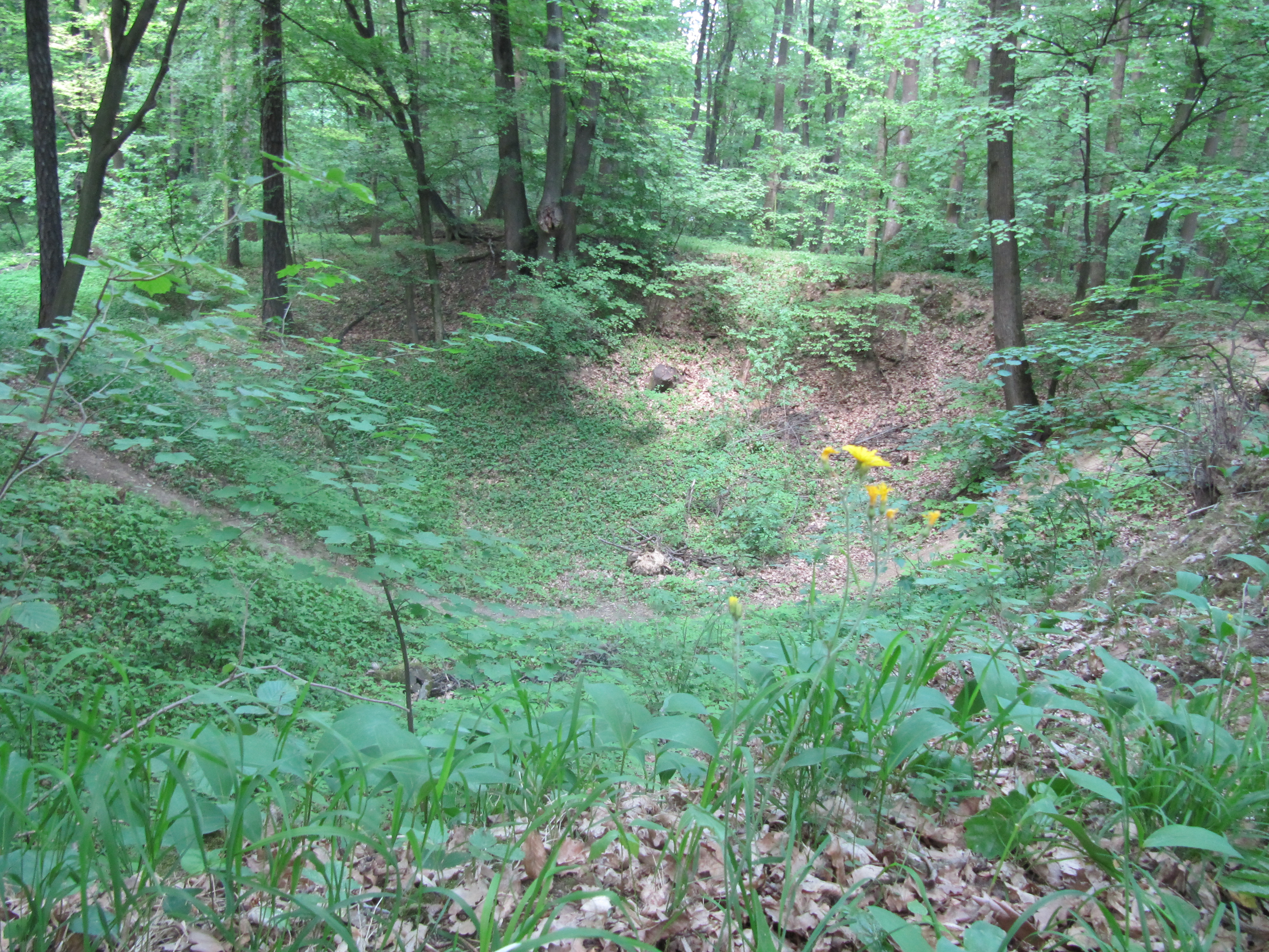 Obora (přírodní památka, okres Kroměříž)